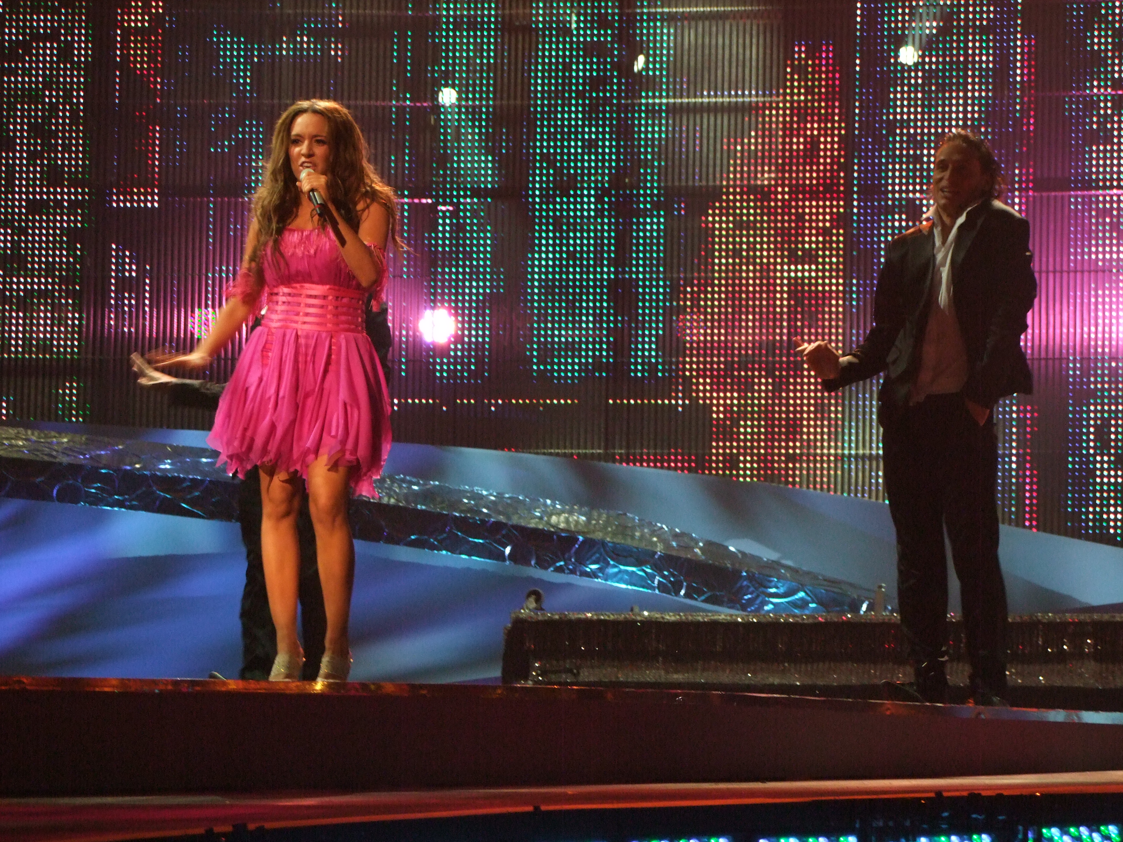 Semifinal 1 EUROVISION 2008